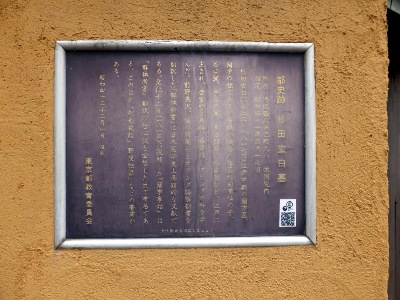 栄閑院の壁に掲げられている都史址